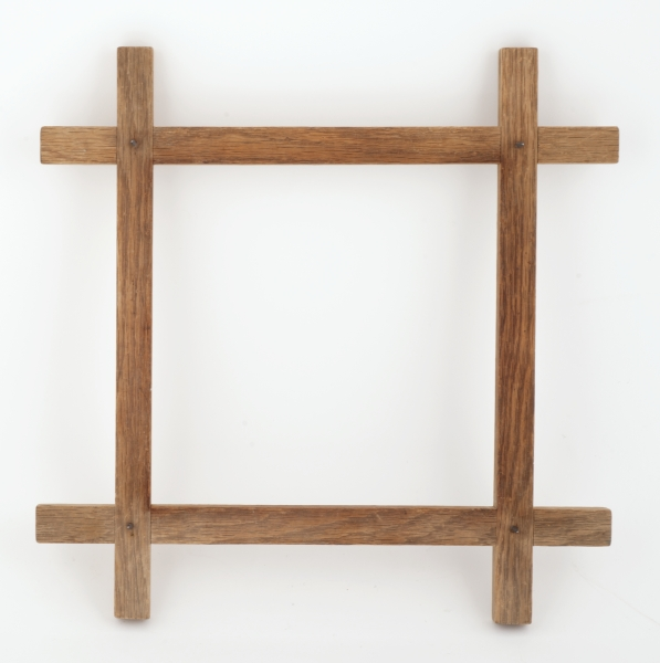 Foto: Jon-Erik Flaksvaag, Norsk Farmasihistorisk Museum